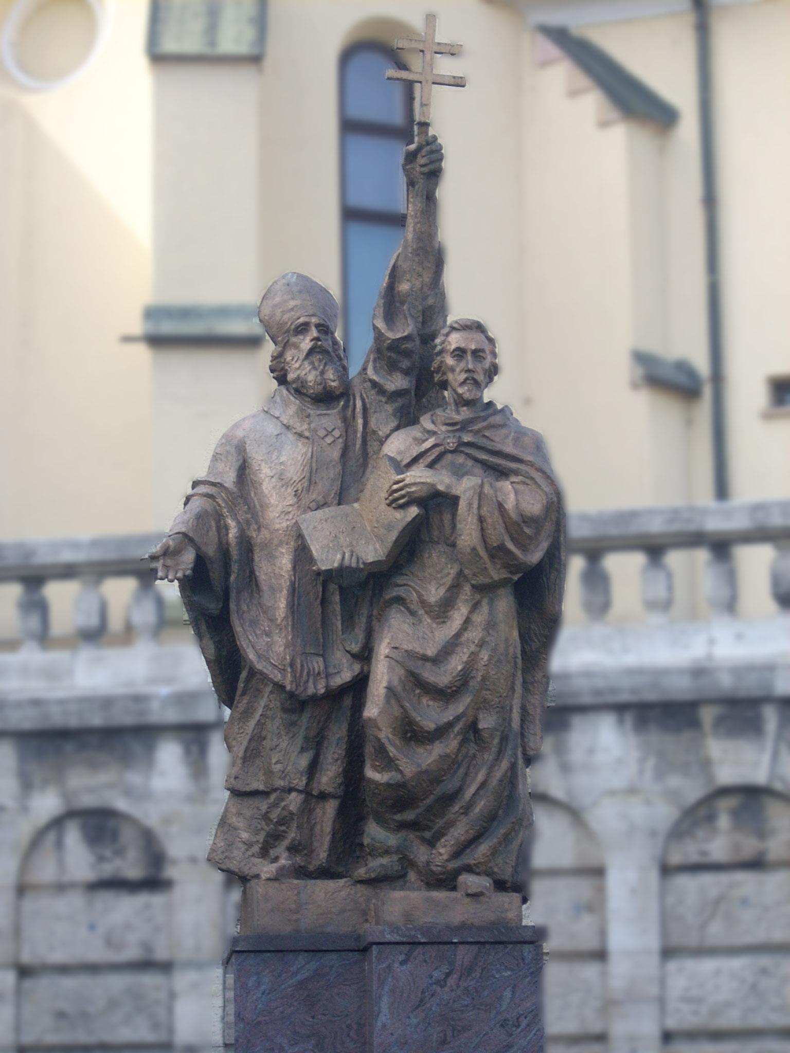 Súsošie sv. Cyrila a Metoda na balistráde pod kostolom.